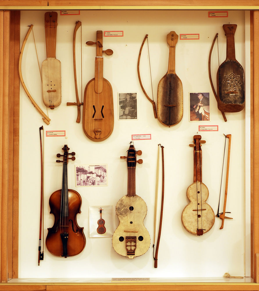 Igurtzitako hariak (1) [1] Arrabita Rabela Biolina Soinuenea - Herri Musikaren Txokoa (Traditional Music Centre; former Documentation Center of Popular Music) Oiartzun, Gipuzkoa, Spain